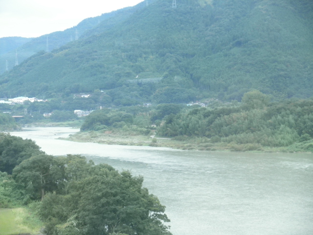 徳島県三好郡東みよし町 吉野川